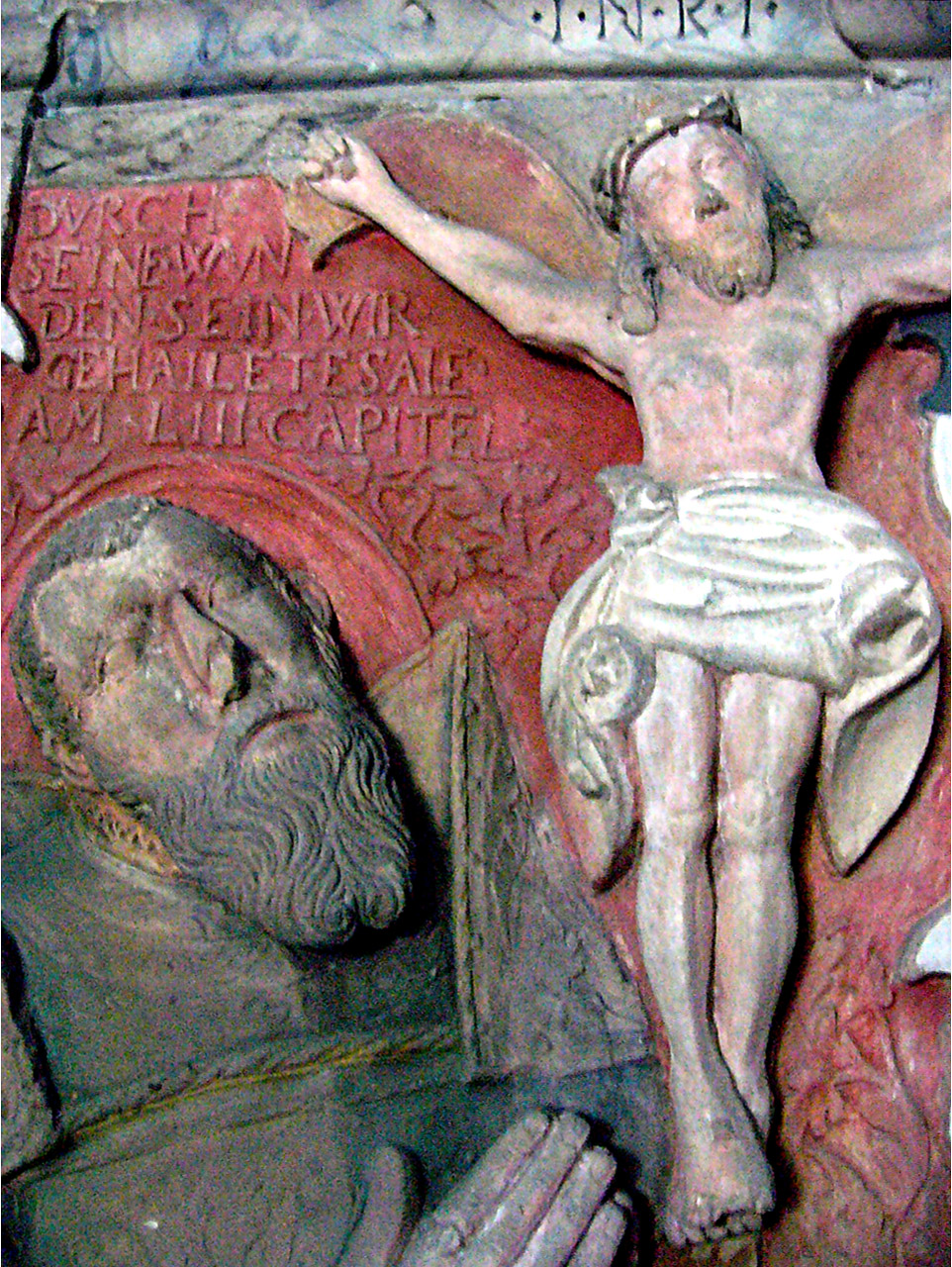 Ausschnitt aus dem Epitaph des Georg Wolf von Kotzau in der Jakobuskirche von Oberkotzau